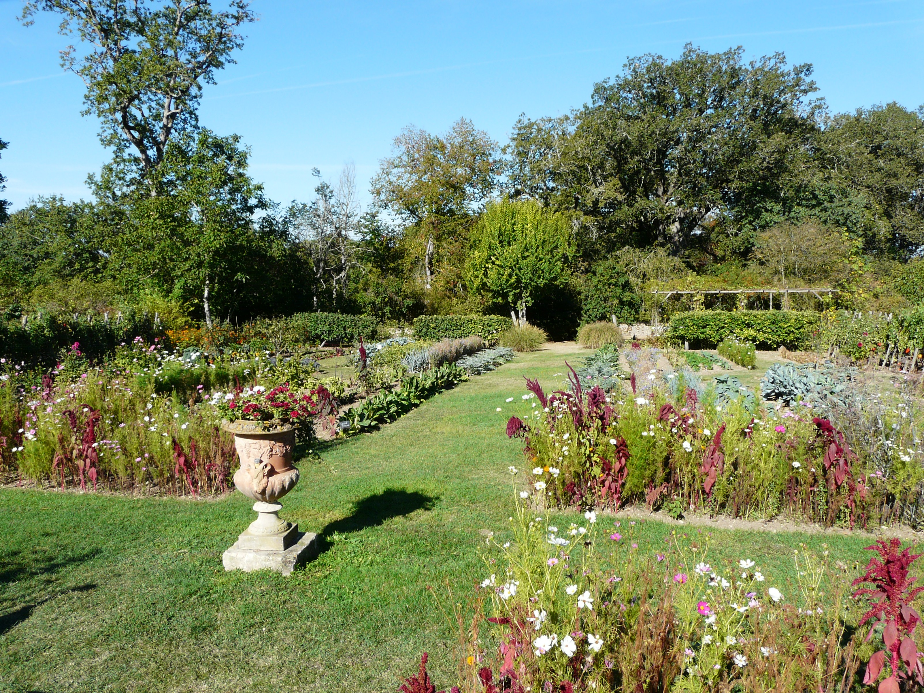 Le potager du château de Pouthet, Eymet, Dordogne, France.